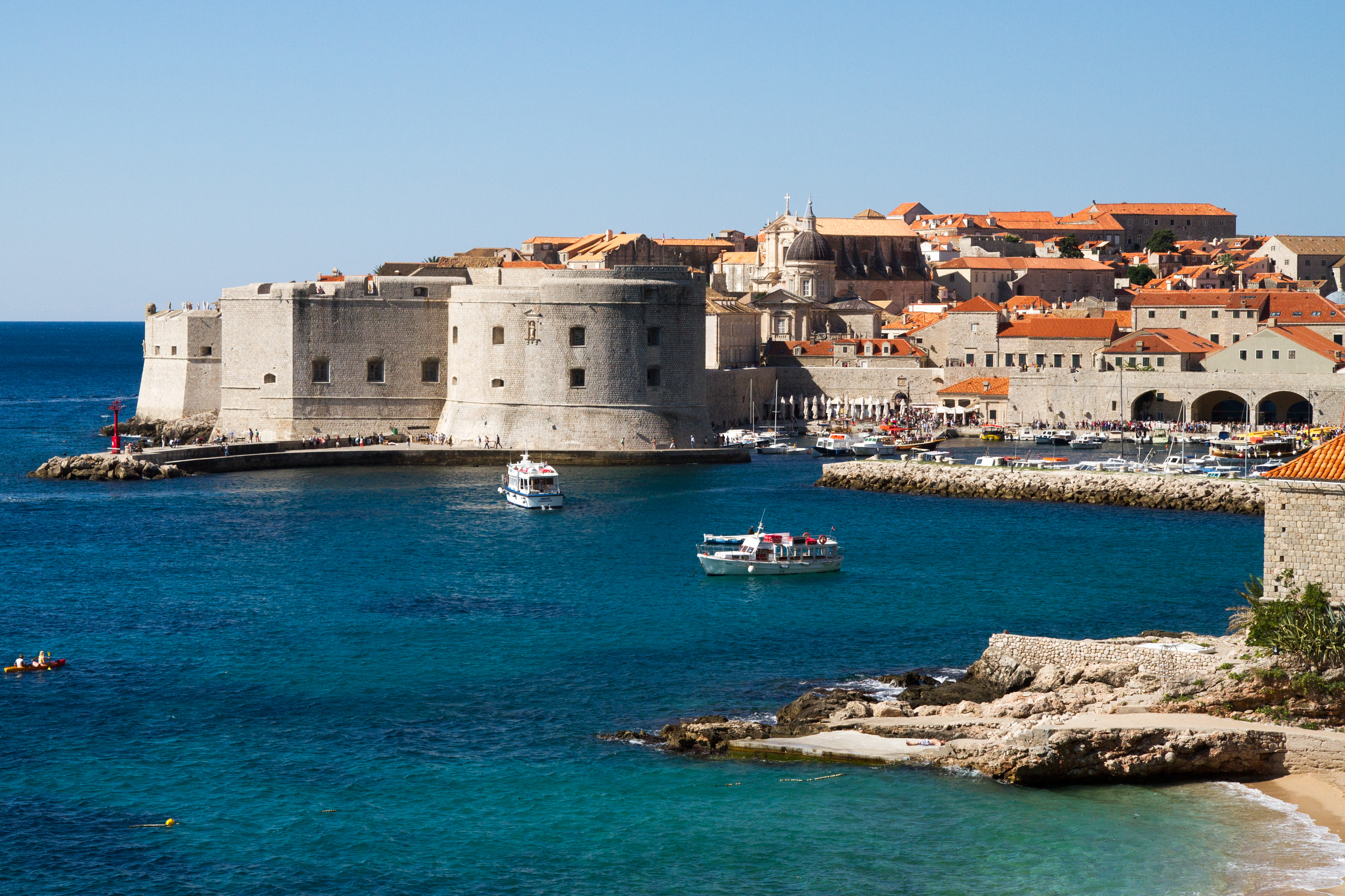 Croatia-4579.jpg